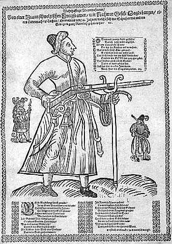 Flugblattdarstellung von Gesche Meiburg: Wahrhafftige Abcontrafactur, Von einer Braunschweigischen Jungfrawen, mit Nahmen Gescke Magdeburges …